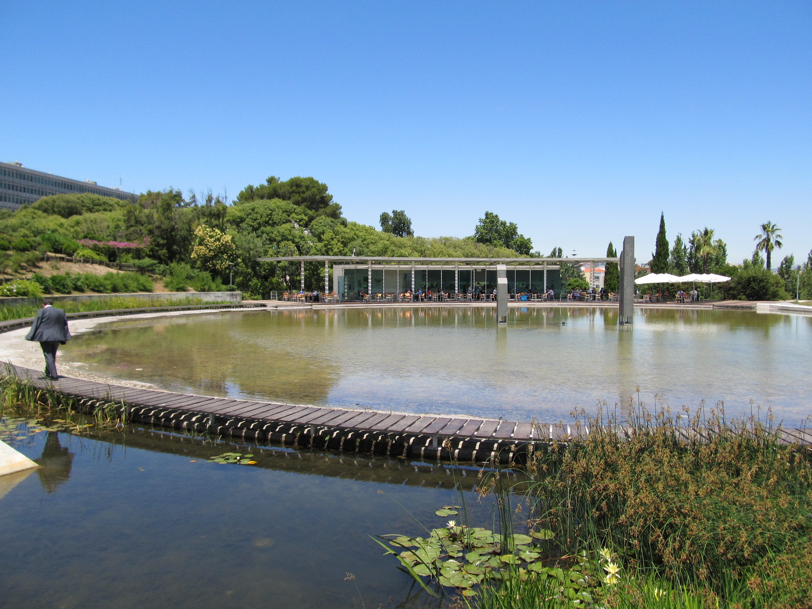 Lago do Jardim Amália Rodrigues em Lisboa.